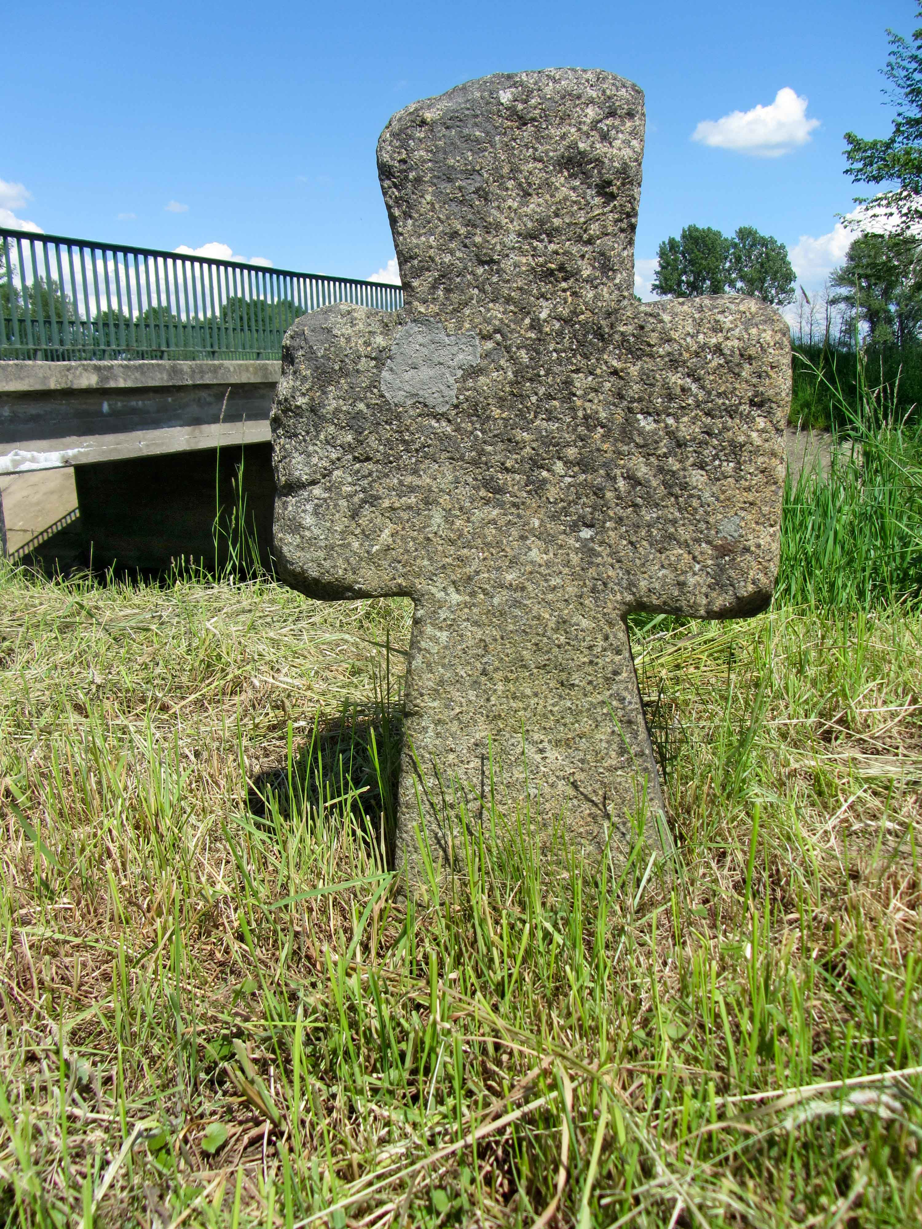 Steinkreuz in Gleina